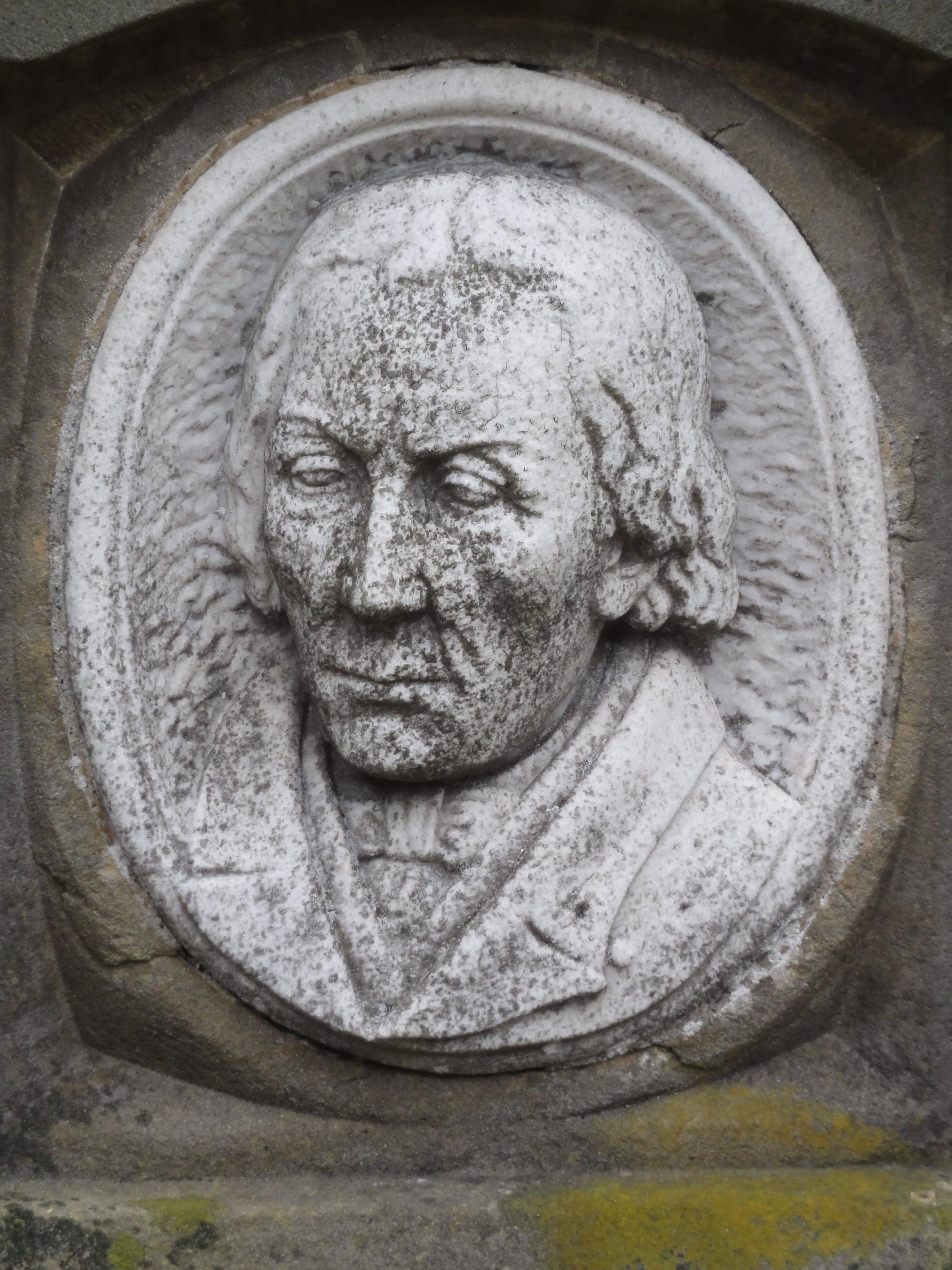 Grave Rijksmonument 514154 reliefportret Le Sage ten Broek op zijn graf 27″ N, 5° 44′ 45.19″ E Object location51° 45′ 18.94″ N, 5° 44′ 44.57″ E